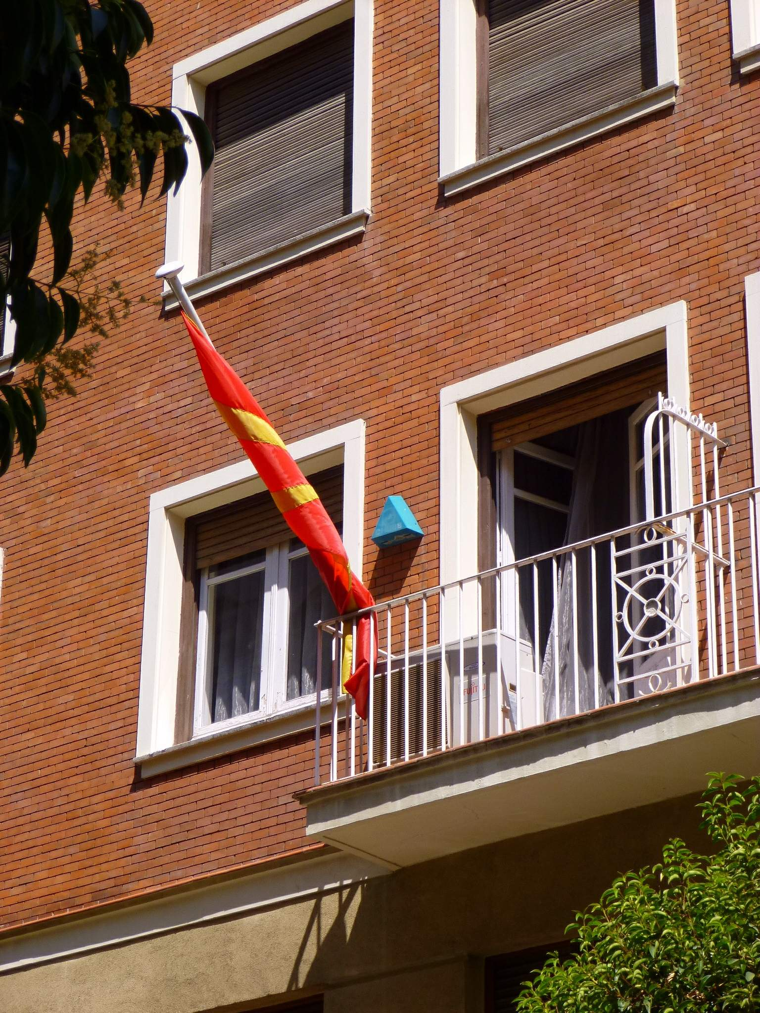 Embajada de Macedonia (FYROM) en Madrid